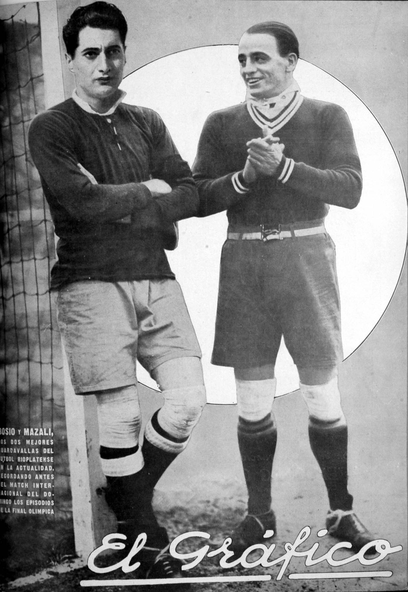 El Grafico del 22 de Junio de 1929. Edicion 520